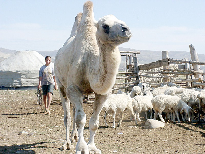 Jurte der tuvinischen Reiternomaden in der Steppe bei Kyzyl, Tuva, Russland